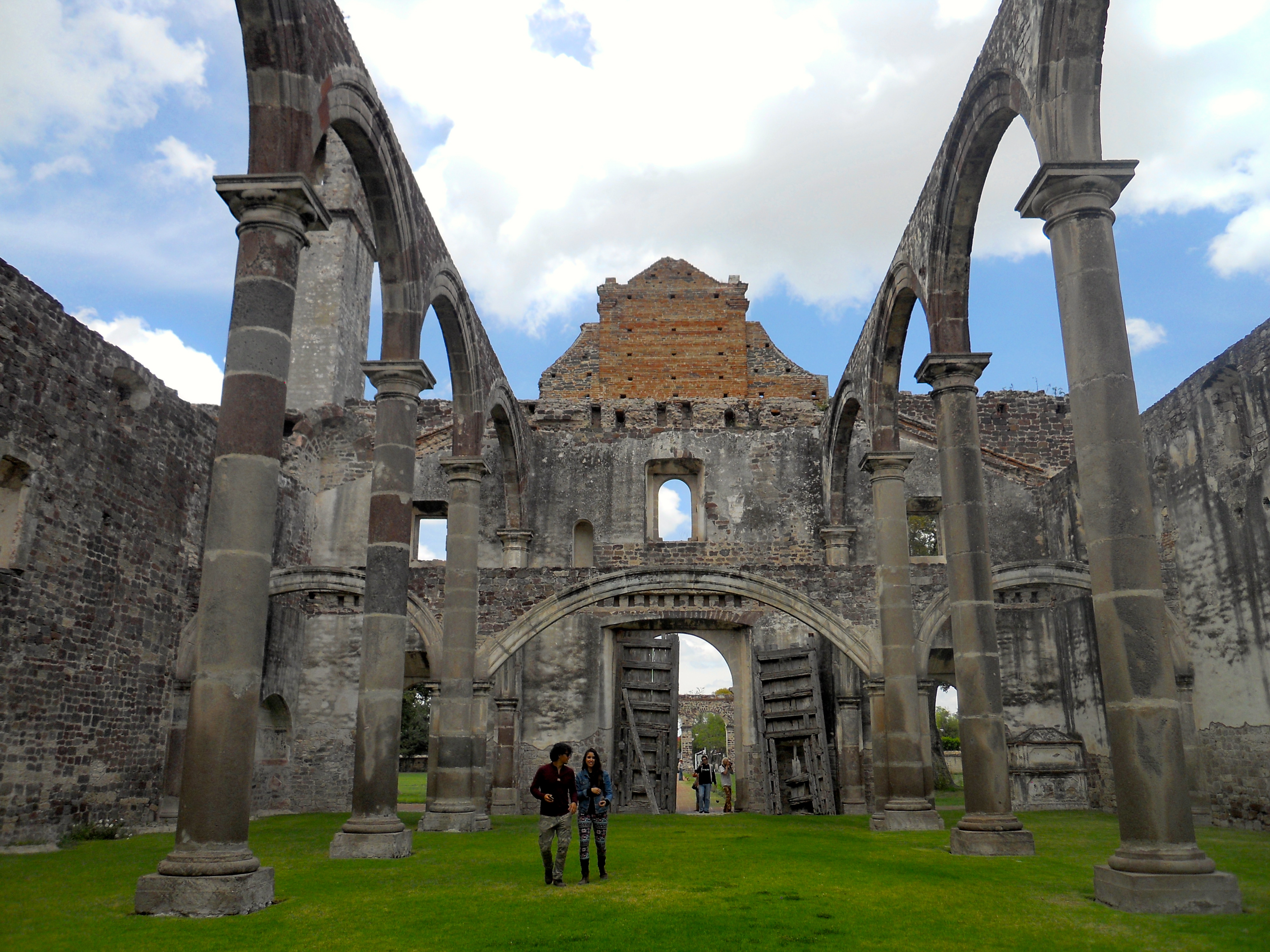 Esta es una vista al interior del ex-convento de Tecali de Herrera localizado en el estado de Puebla, México